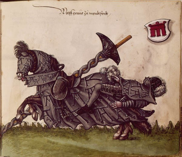 Graf Wolfgang I. von Montfort-Rothenfels als Teilnehmer an einem Turnier. Aus dem Turnierbuch Herzog Wilhelms IV. von Bayern. (Bayerische Staatsbibliothek, cgm 2800, S. 21)